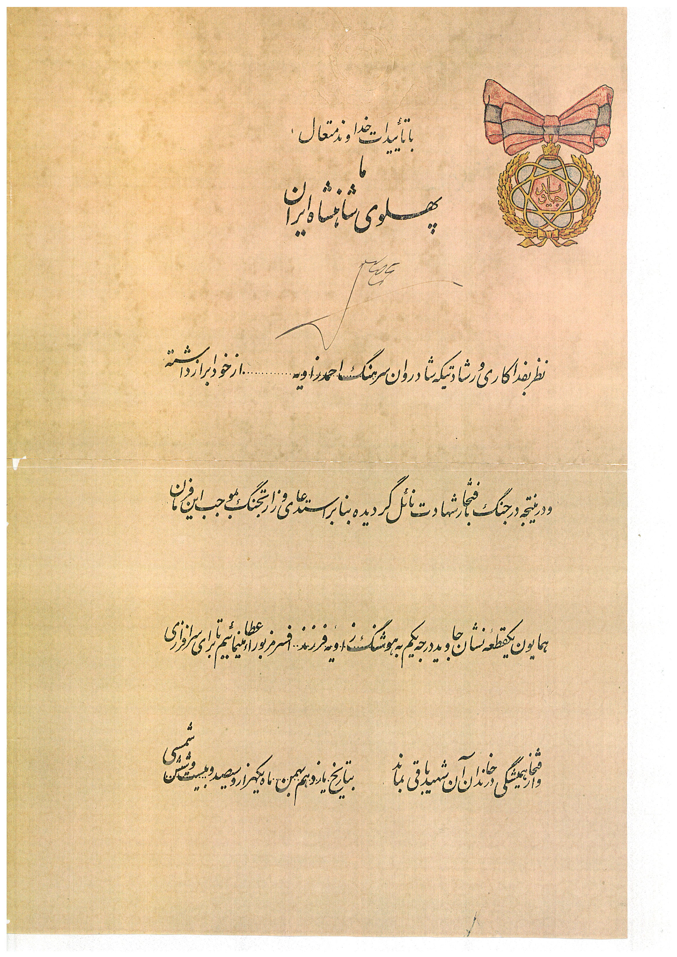 حکم نشان درجه یک